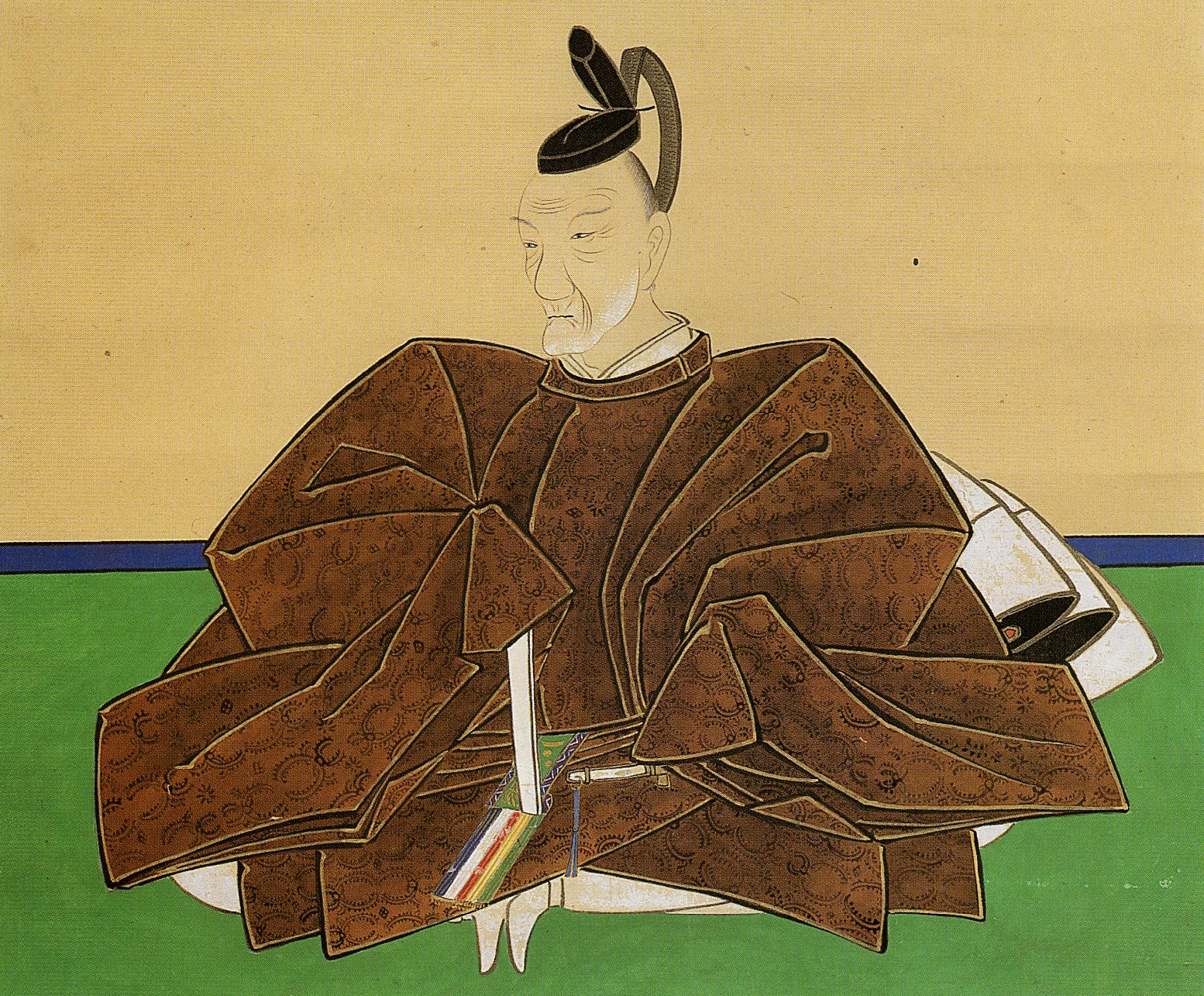 徳山藩七代藩主・毛利就馴の肖像画。